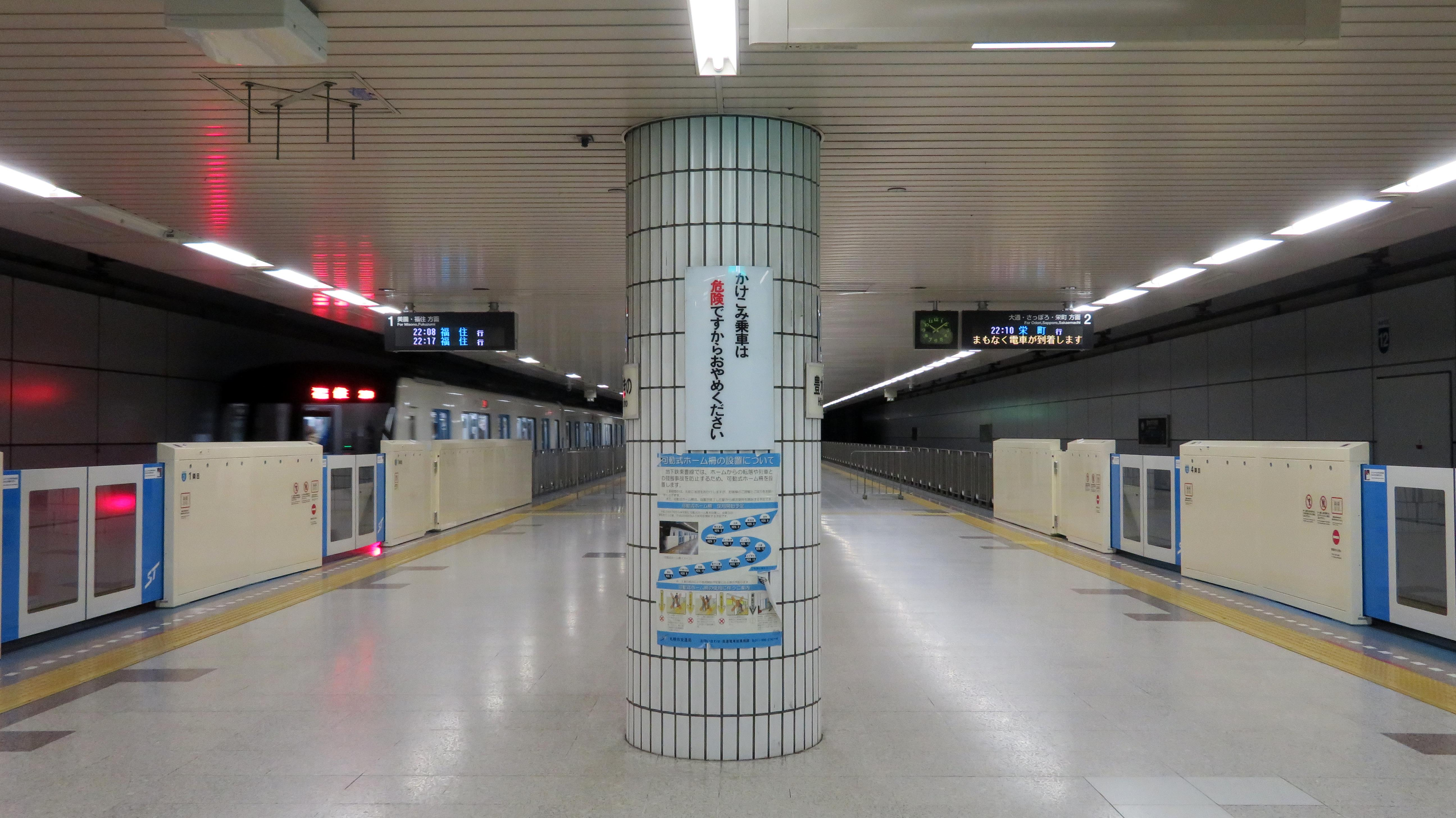 豊水すすきの駅ホーム